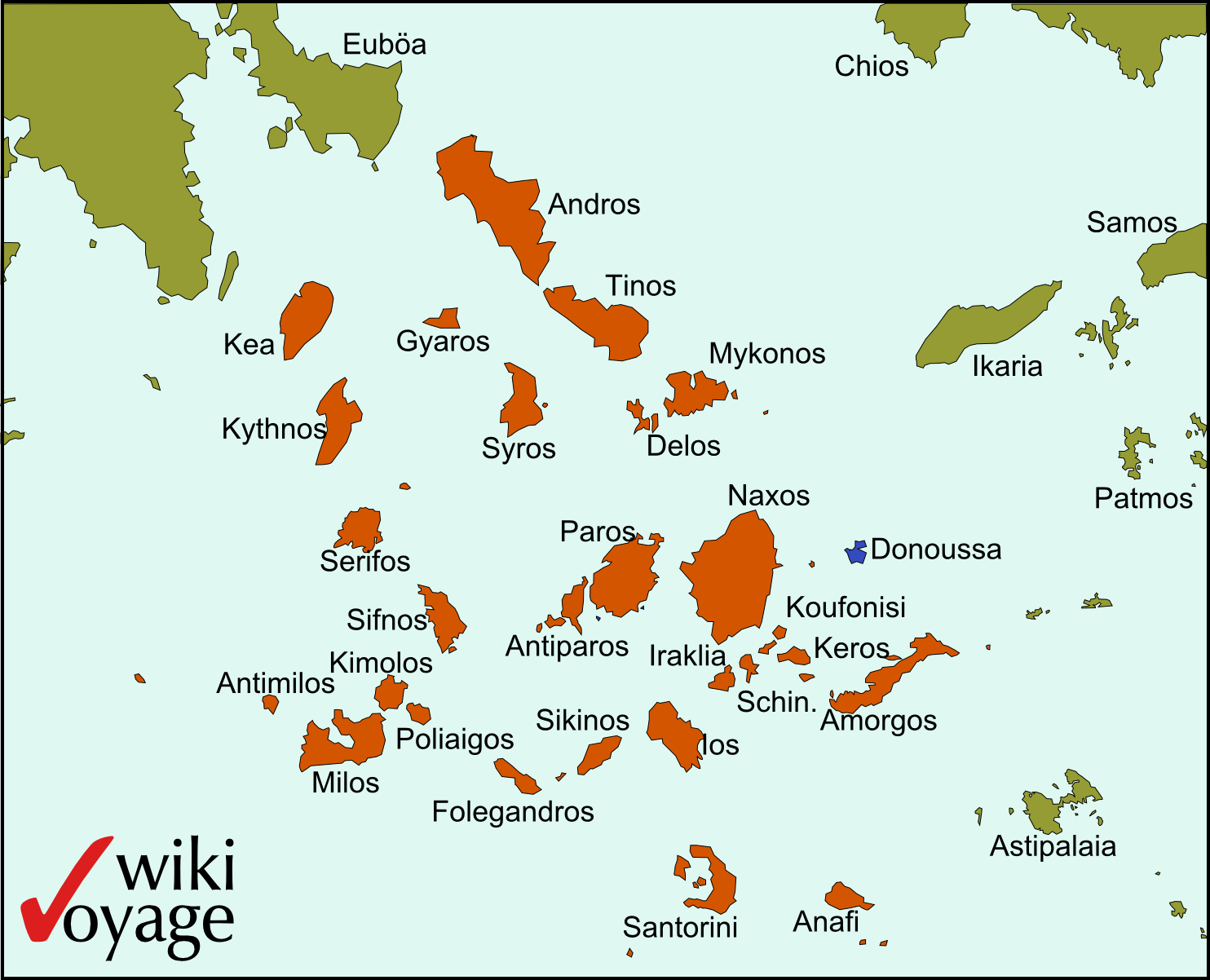 Lage der Insel Donoussa in den Kykladen